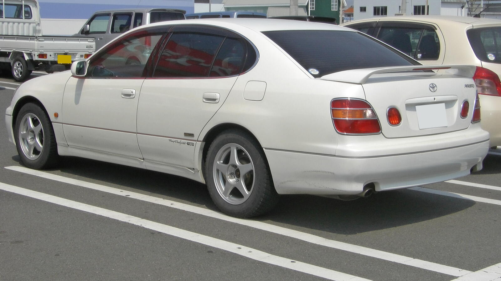 トヨタ・アリスト（2代目）